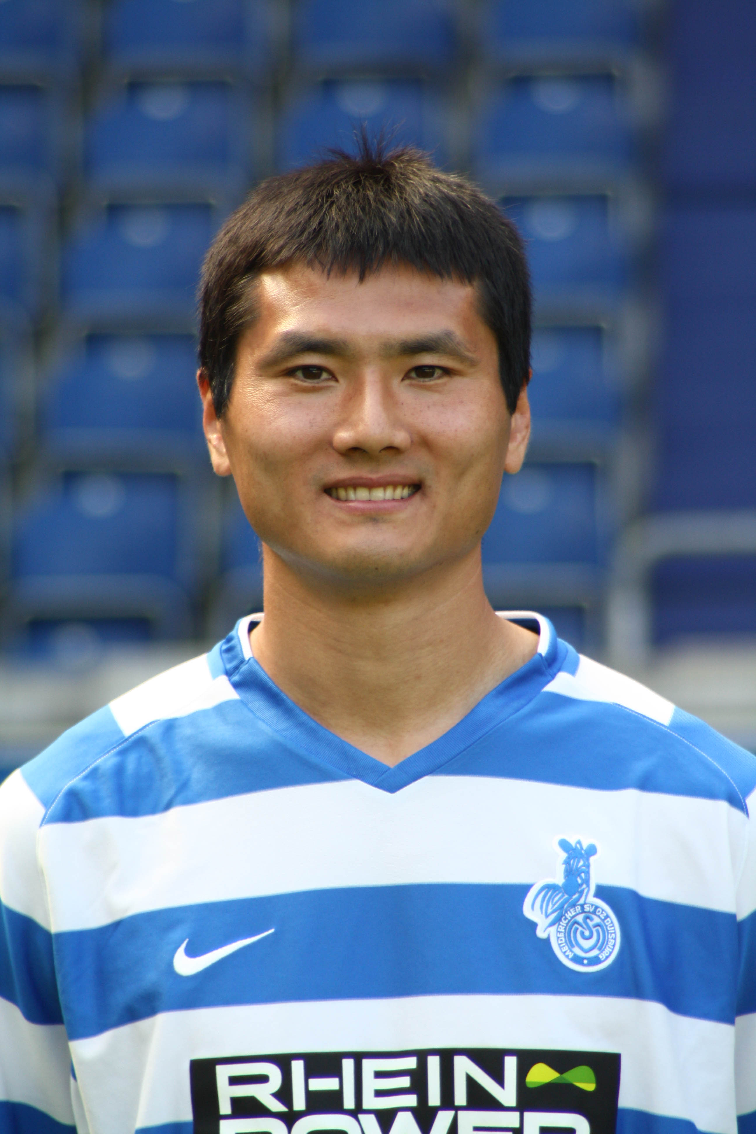 Jiayi Shao, MSV Duisburg